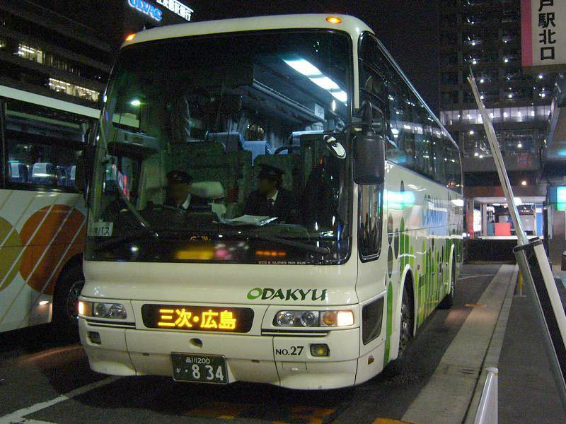 登録番号 品川200か・834 小田急シティバス所属 車番27 夜行用車両 （各系統で共通運用） 2006年11月18日 東京駅八重洲口にて撮影